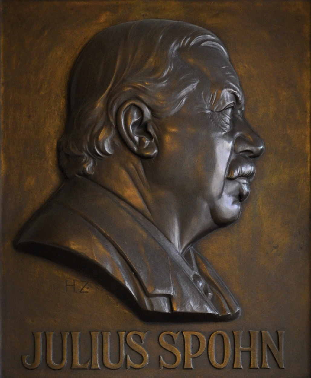 Konzerthaus Ravensburg, Vestibül, Gedenktafel für den Ehrenbürger und Mäzen Julius Spohn (1911), Detail